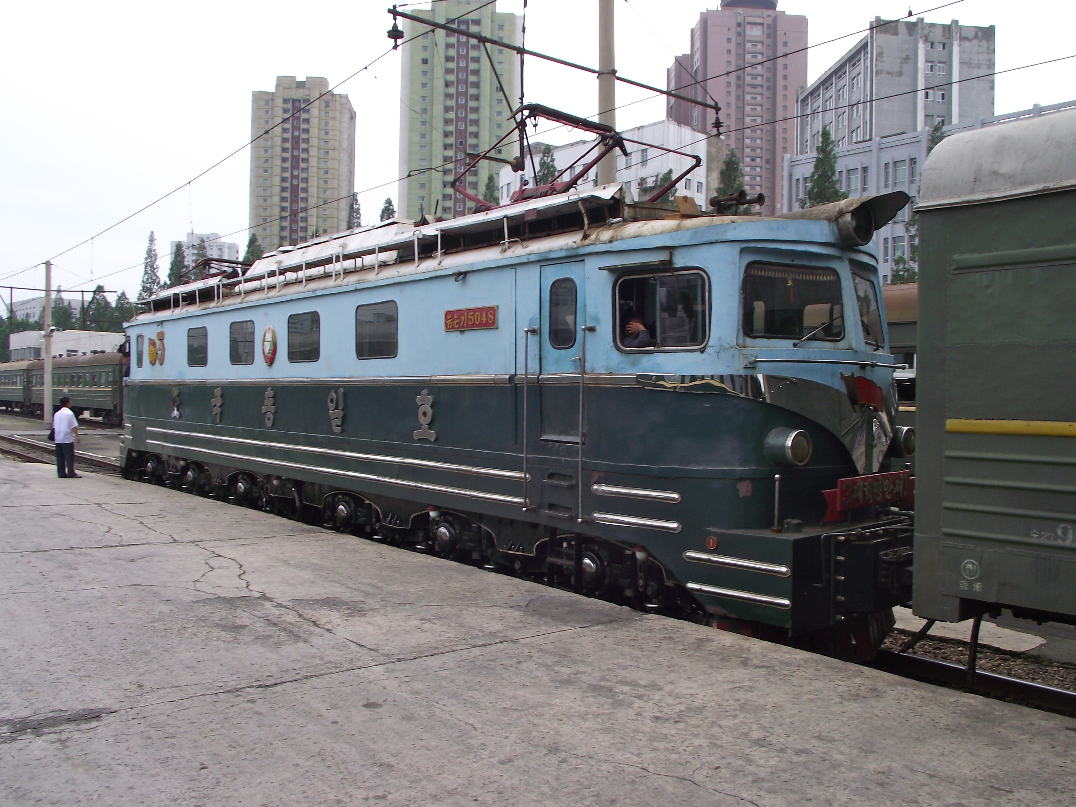 Pyongyang to Sinuju Train at Pyongyang Railway Station